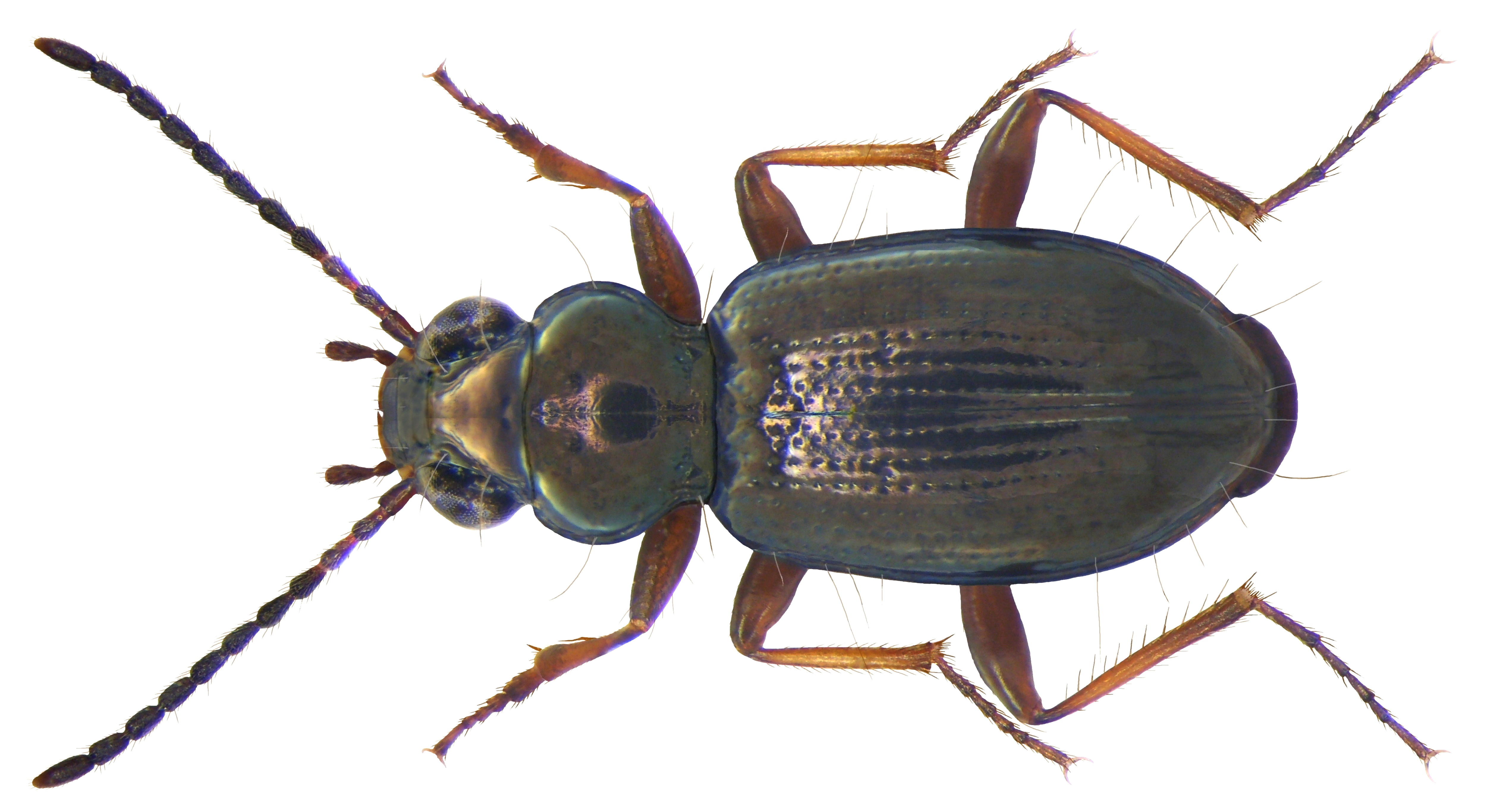 Familie: Carabidae Groesse: 2,7-4,1 mm Verbreitung: palaearktisch, nach Nordamerika eingeschleppt Fundort: Germania, Bayern, Oberfranken, Neuenmarkt leg.det. U.Schmidt, 1972 Photo: U.Schmidt, 2009